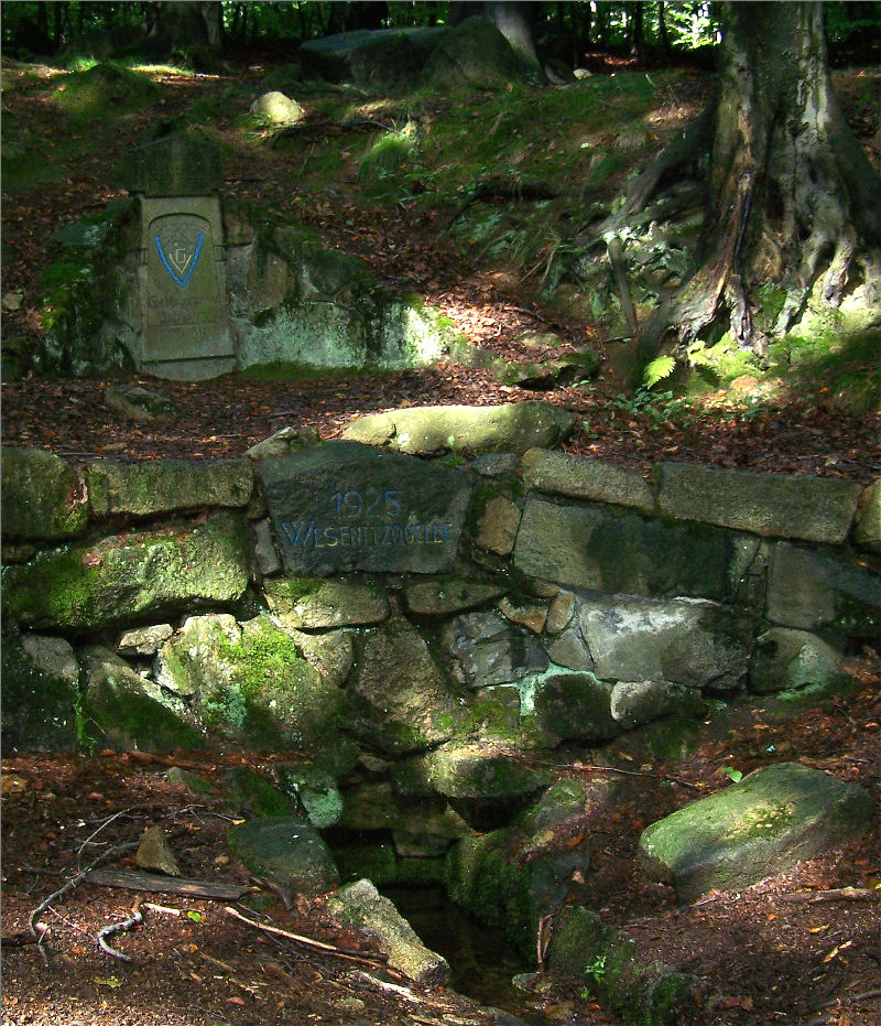 Wesenitzquelle auf dem Valtenberg, Neukirch (Lausitz)